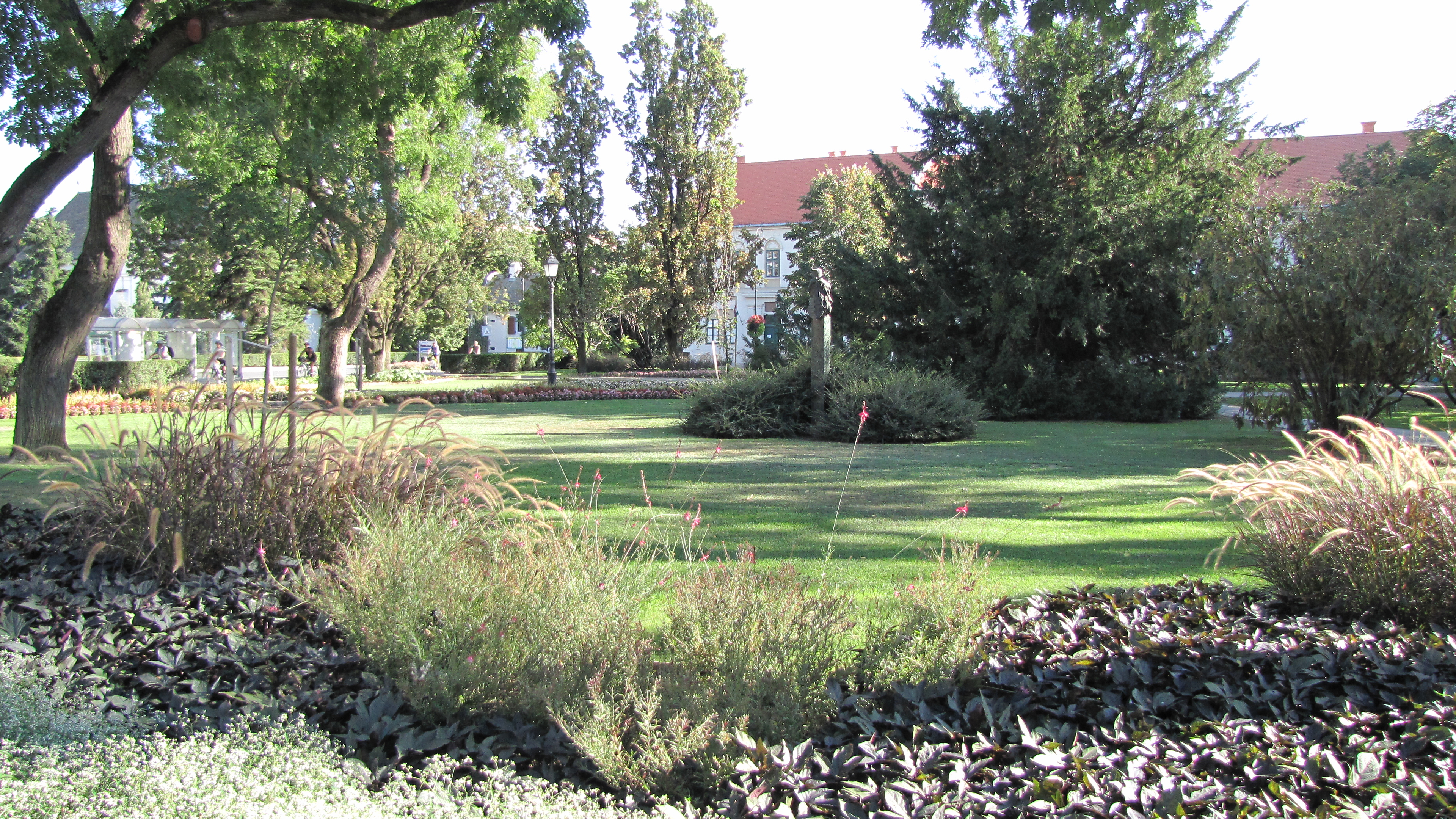 Hódmezővásárhely, Kossuth tér